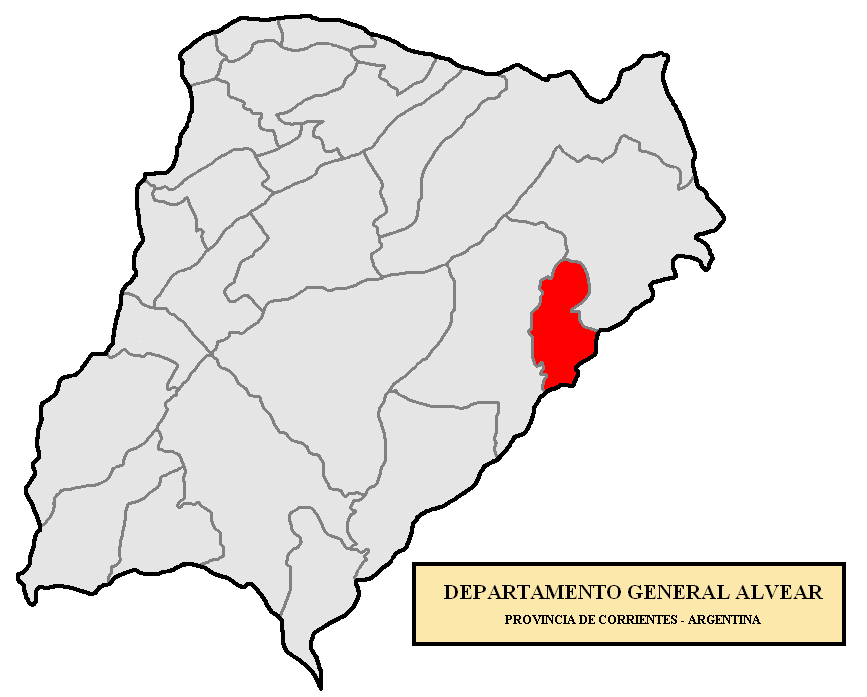 Ubicación del departamento General Alvear. Localización del Departamento General Alvear, en la provincia de Corrientes, Argentina.